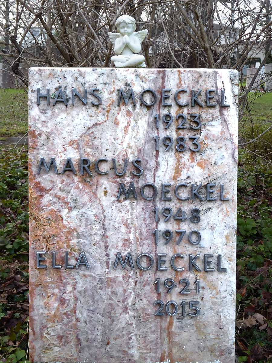 Hans Moeckel (1923–1983) Musical-Komponist, Dirigent beim Stadttheater St. Gallen und des Unterhaltungsorchesters des Schweizer Radios. Grab auf dem Friedhof Hörnli, Riehen, Basel